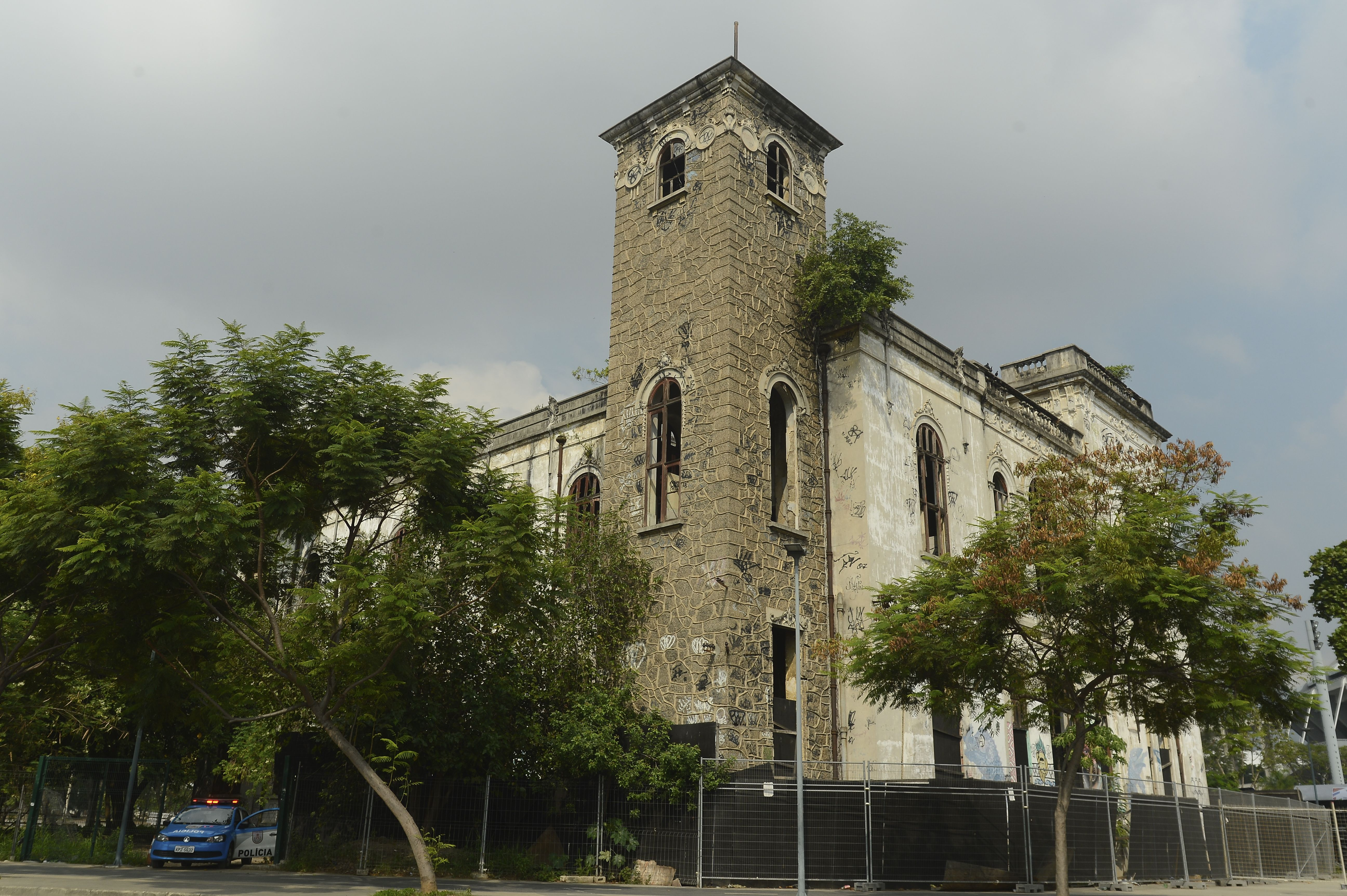 Rio de Janeiro - Prédio do antigo Museu do Índio, ao lado do Maracanã, zona norte da cidade (Tânia Rêgo/Agência Brasil)